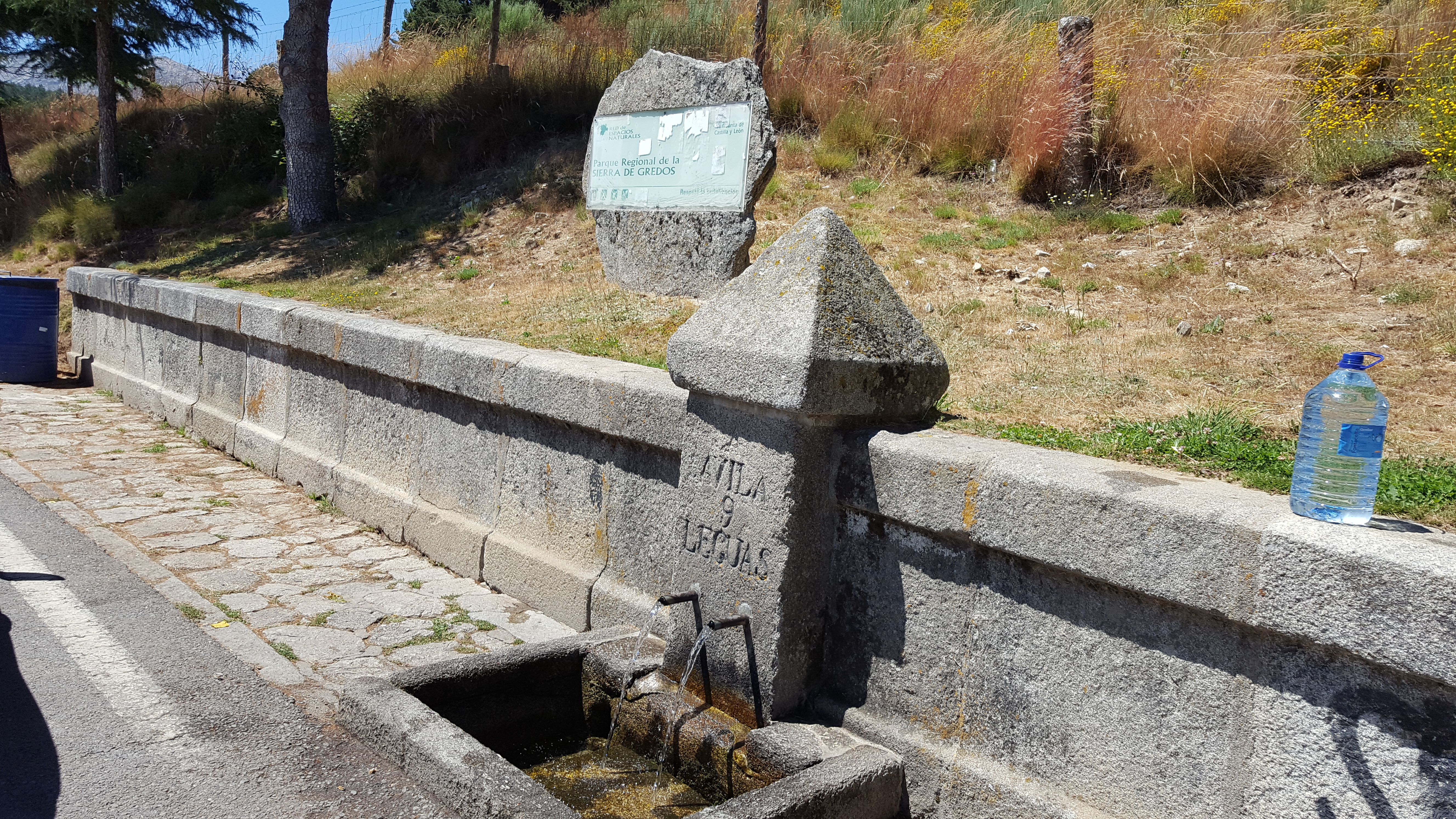 Fuente en el parque regional de Gredos, provincia de Ávila, España